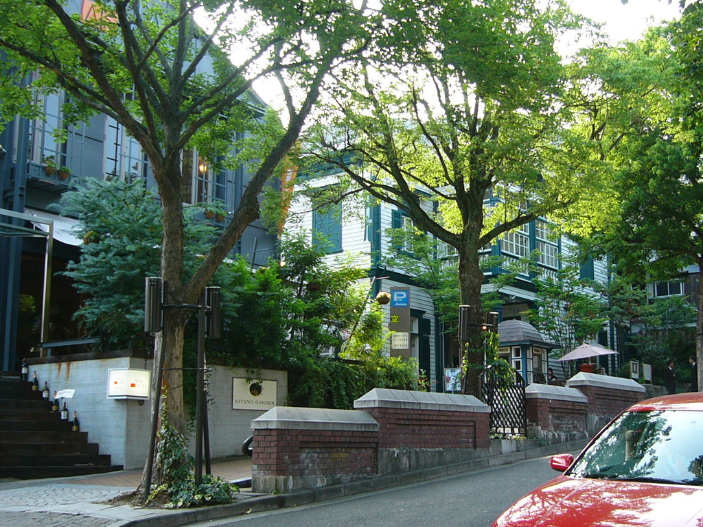 北野坂，兵庫県神戸市中央区